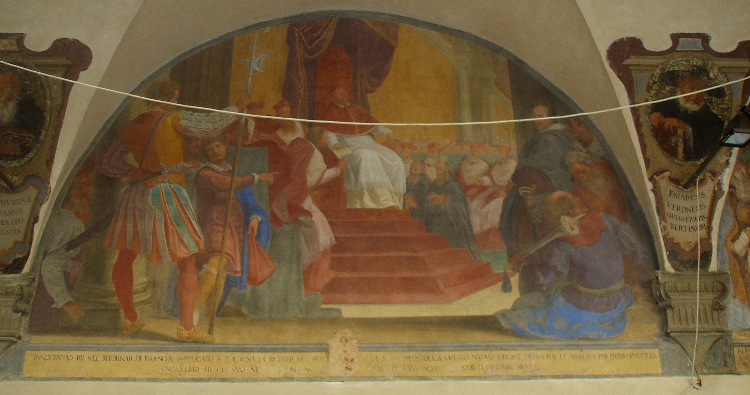 Santissima annunziata chiostro grande Matteo Rosselli, Innocenzo IV e il cardinale Fieschi protettore_dell'ordine_dei_servi. in Florence, italy